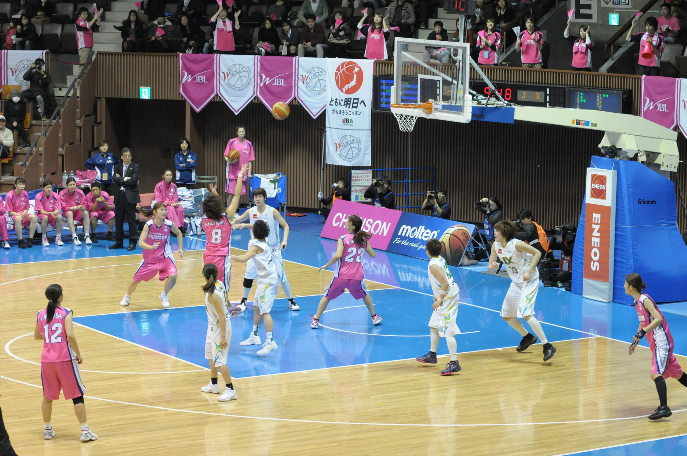 WJBL 12-13プレーオフセミファイナル、、シャンソン対JX。代々木第二体育館で。